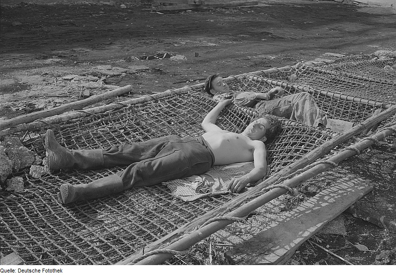 Original image description from the Deutsche FotothekMittagspause auf einer Baustelle. Bauarbeiter liegen in (am Boden befindlichen) Sicherungsnetzen